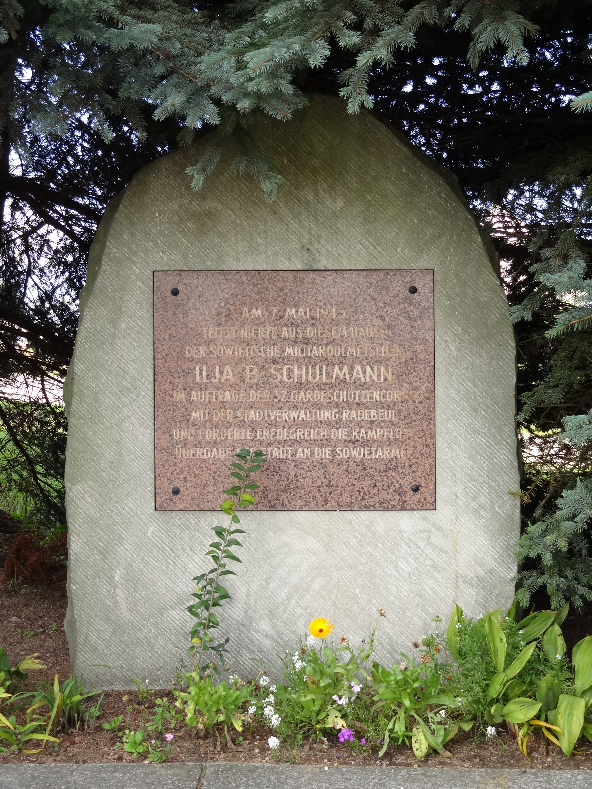 „Am 7. Mai 1945 telefonierte aus diesem Haus der sowjetische Militärdolmetscher Ilja B. Schulmann im Auftrag des 32. Gardeschützencorps mit der Stadtverwaltung Radebeul und forderte erfolgreich die kampflose Übergabe der Stadt an die Sowjetarmee.“, Dippelsdorf (Moritzburg)